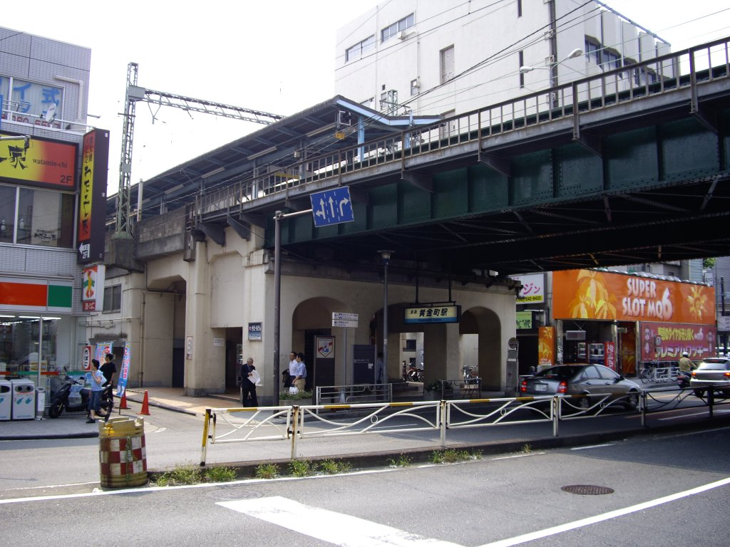 Exit of Koganechō Station, Keikyū Main Line, Minami-ku, Yokohama, Kanagawa Japan